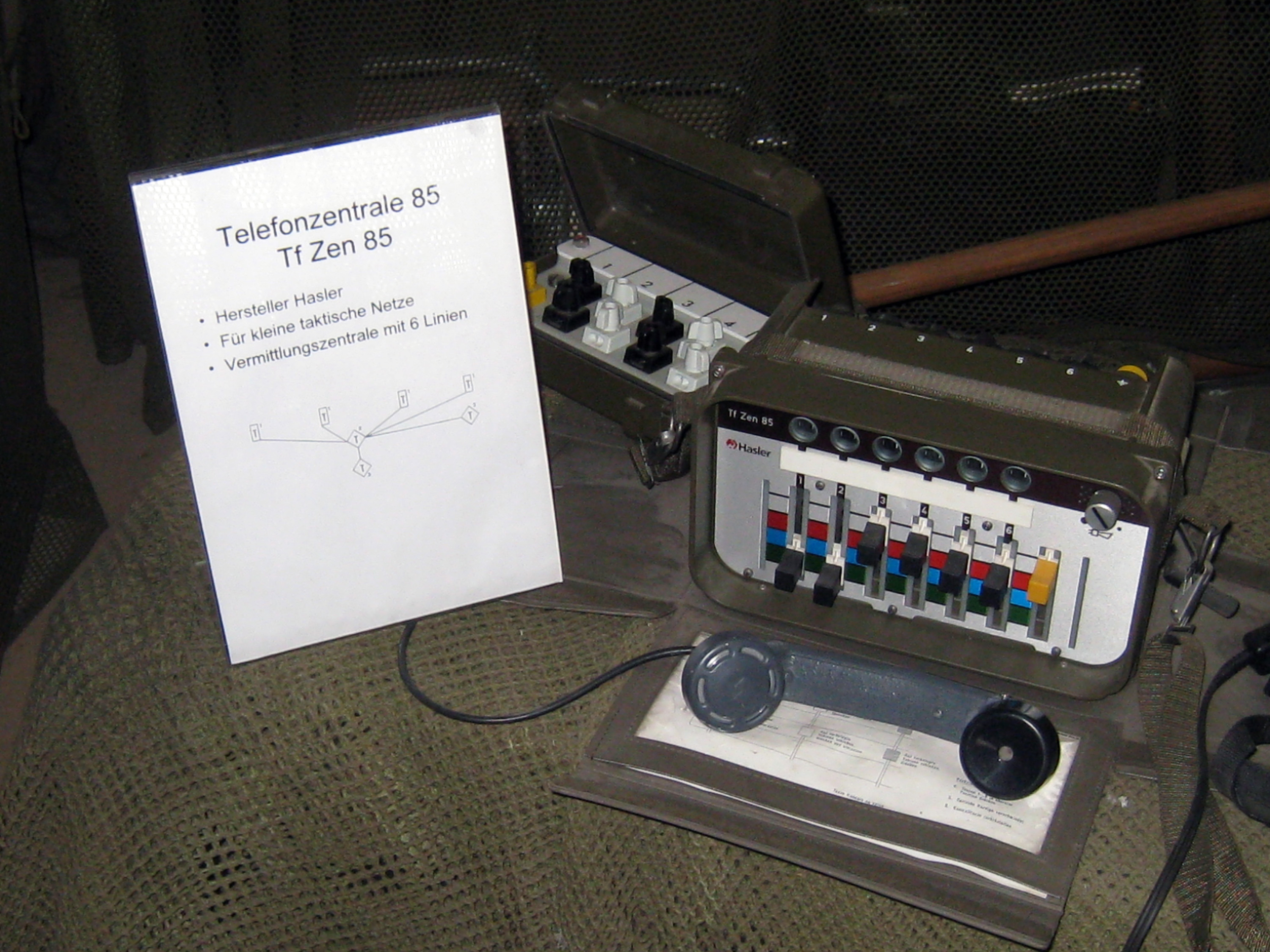 Telefonzentrale 85 der Schweizer Armee im Militärmuseum Full